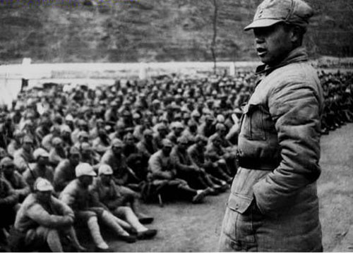 1940年5月，陈锡联同志任一二九师三八五旅旅长时，在“百团大战”前作战斗动员